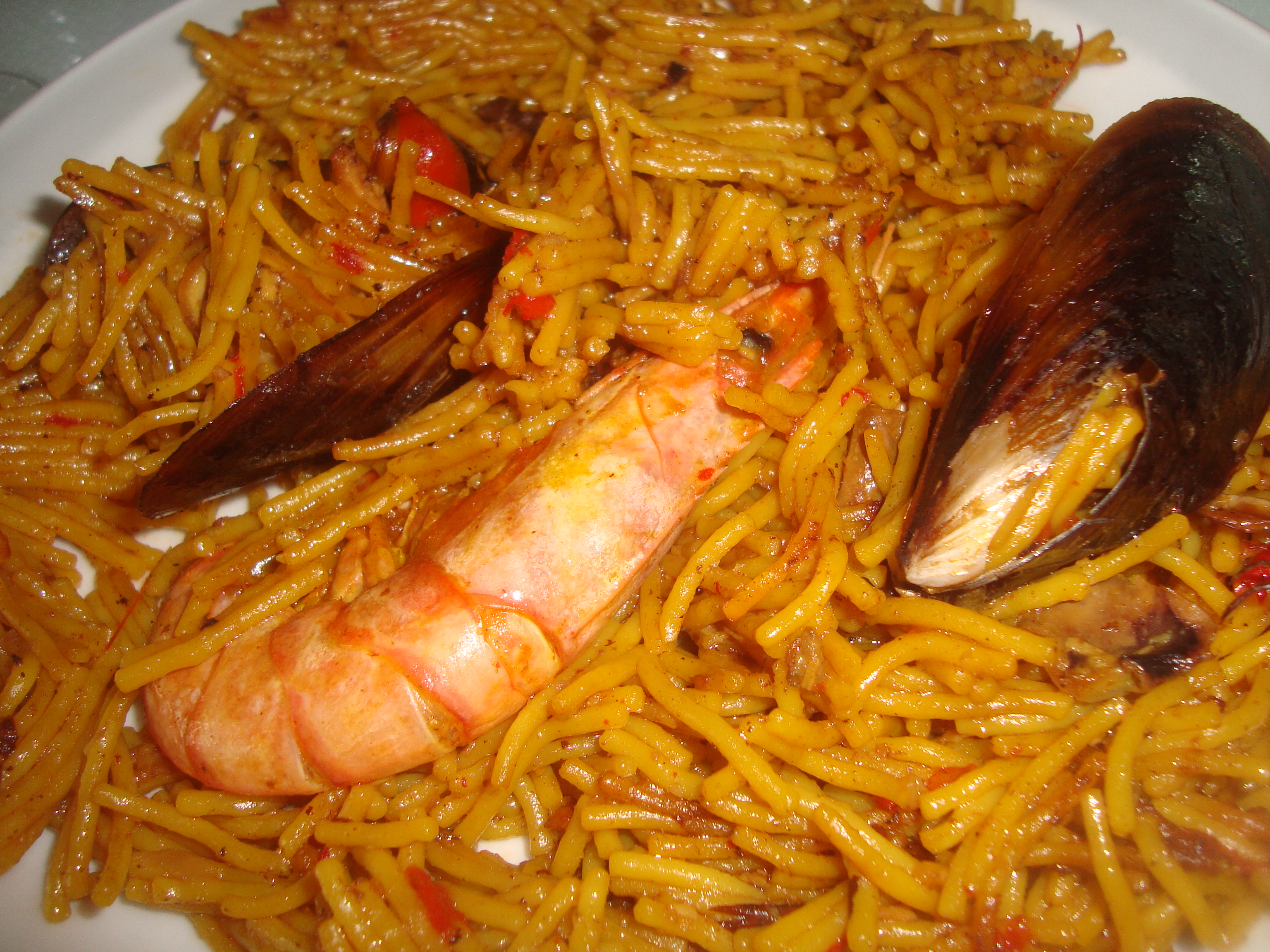 La fideuá es un plato marinero originario de las costas de Comunidad Valenciana. Ingredientes: gambas, mejillones, rape troceado, fideos del nº2 o del 3, tomate picado, pimiento rojo, pimentón, cebolla rallada, azafrán en polvo, aceite de oliva, sal, caldo de pescado.